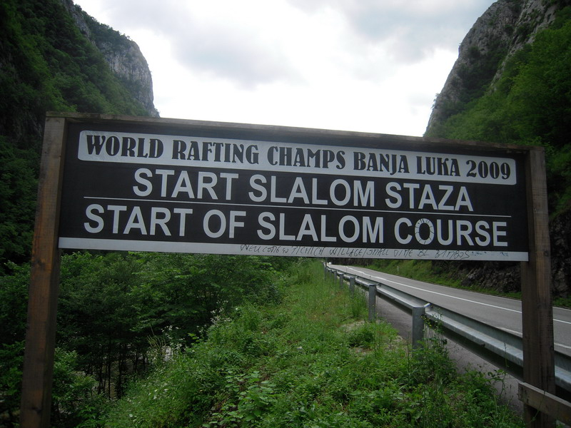 Start slalom staza svjetskog prvenstva u raftingu 2009. Banja Luka